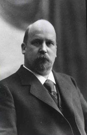 Anton Frederik Lütken (1856-1917), Danish supreme court judge